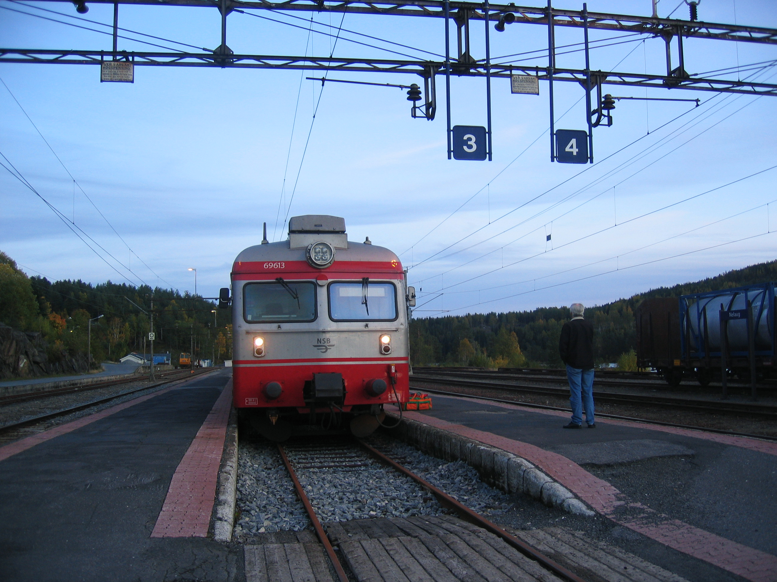 Nelaug stasjon. Tog til Arendal venter i spor 3.